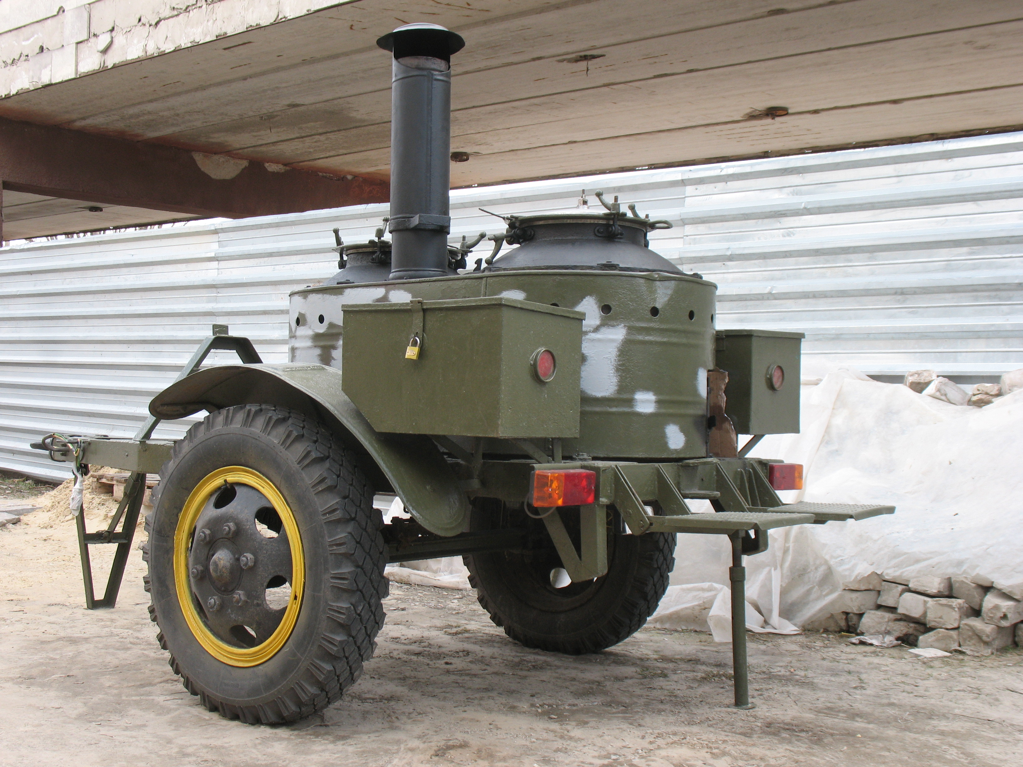 Армейская полевая кухня СССР